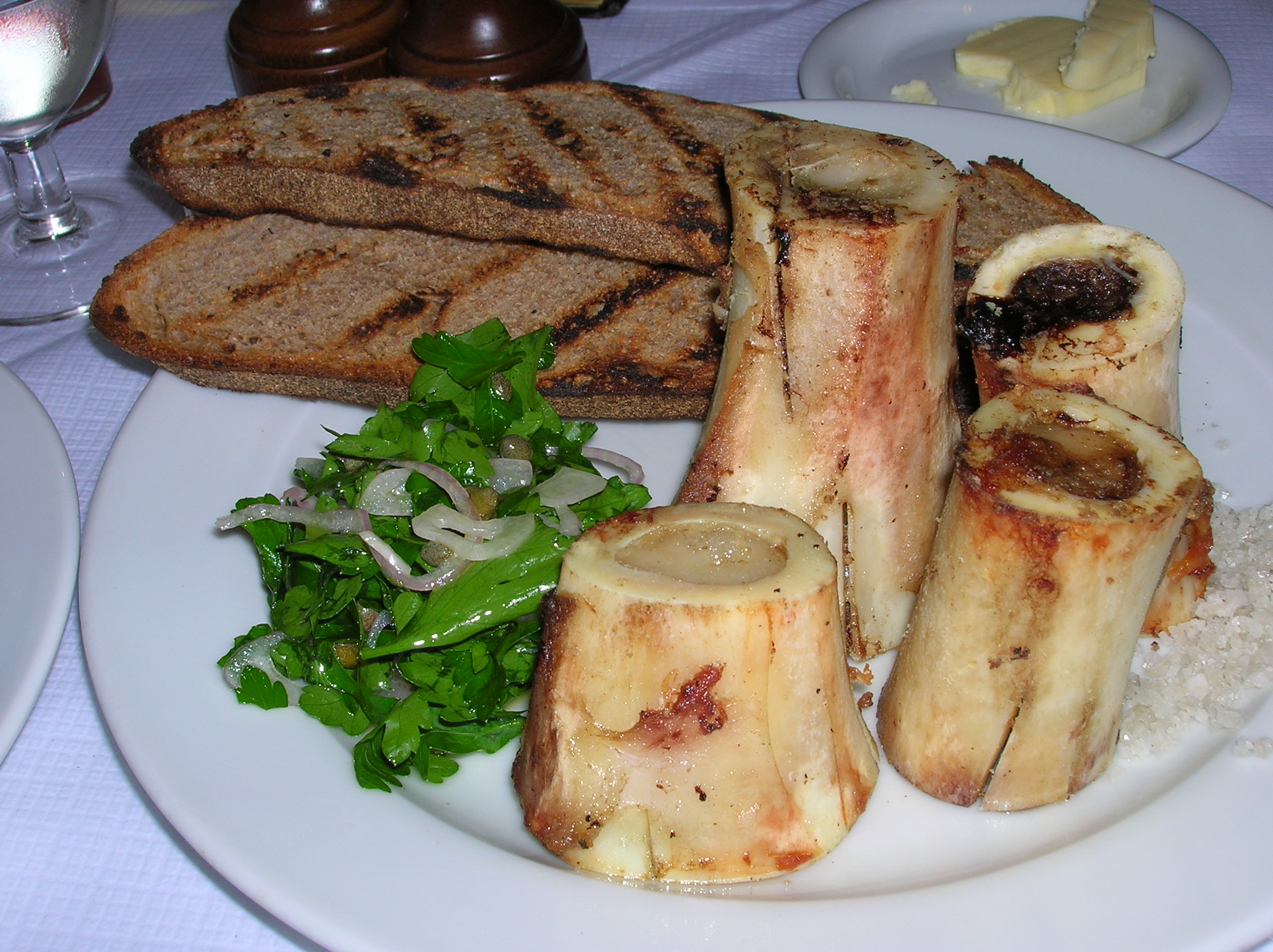 מח עצמות של צבי עם סלט פטרוזיליה, במסעדת סנט ג'והן, לונדון